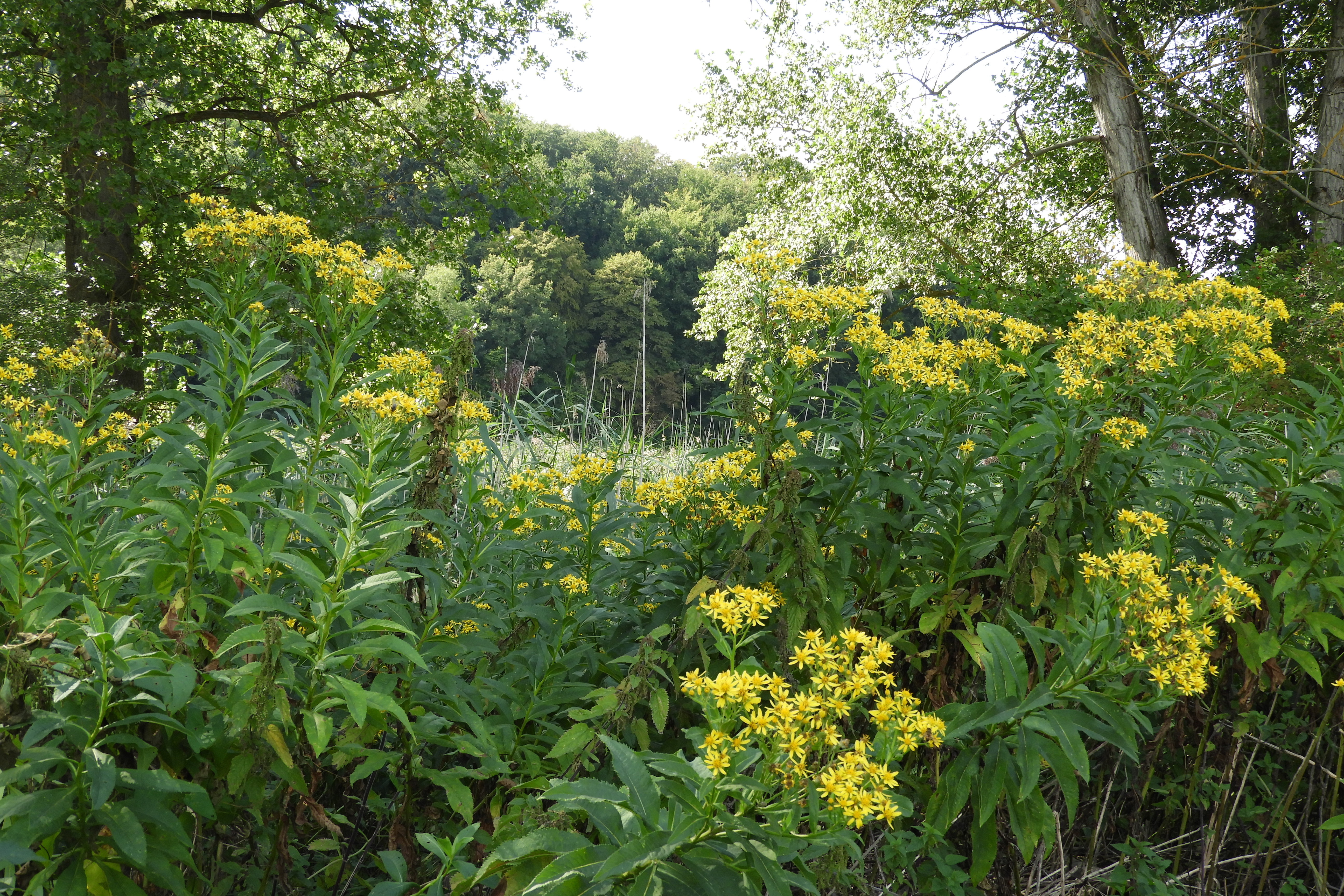 Der „Ermschwerder Heegen“ ist eine, in das untere Tal der Werra hineinragende Erhebung aus Muschelkalk im nordhessischen Werra-Meißner-Kreis. Er erstreckt sich über eine Höhenlage von 132 bis 235 m und besteht aus einem bewaldeten Bereich, einem Feuchtgebiet, Kalkmagerrasen, Streuobstbeständen und landwirtschaftlich genutzten Flächen. Wegen seinem artenreichen Altholzbestand und einem großen Sumpfbiotop mit dem Vorkommen seltener Pflanzen-, Insekten- und Vogelarten wurde der „Heegen“ im Dezember 1985 als Naturschutzgebiet ausgewiesen und später, mit gleichen Gebietsgrenzen und Erhaltungszielen, als Flora-Fauna-Habitat-Gebiet Teil des europäisch vernetzten Schutzgebietssystems „Natura 2000“.